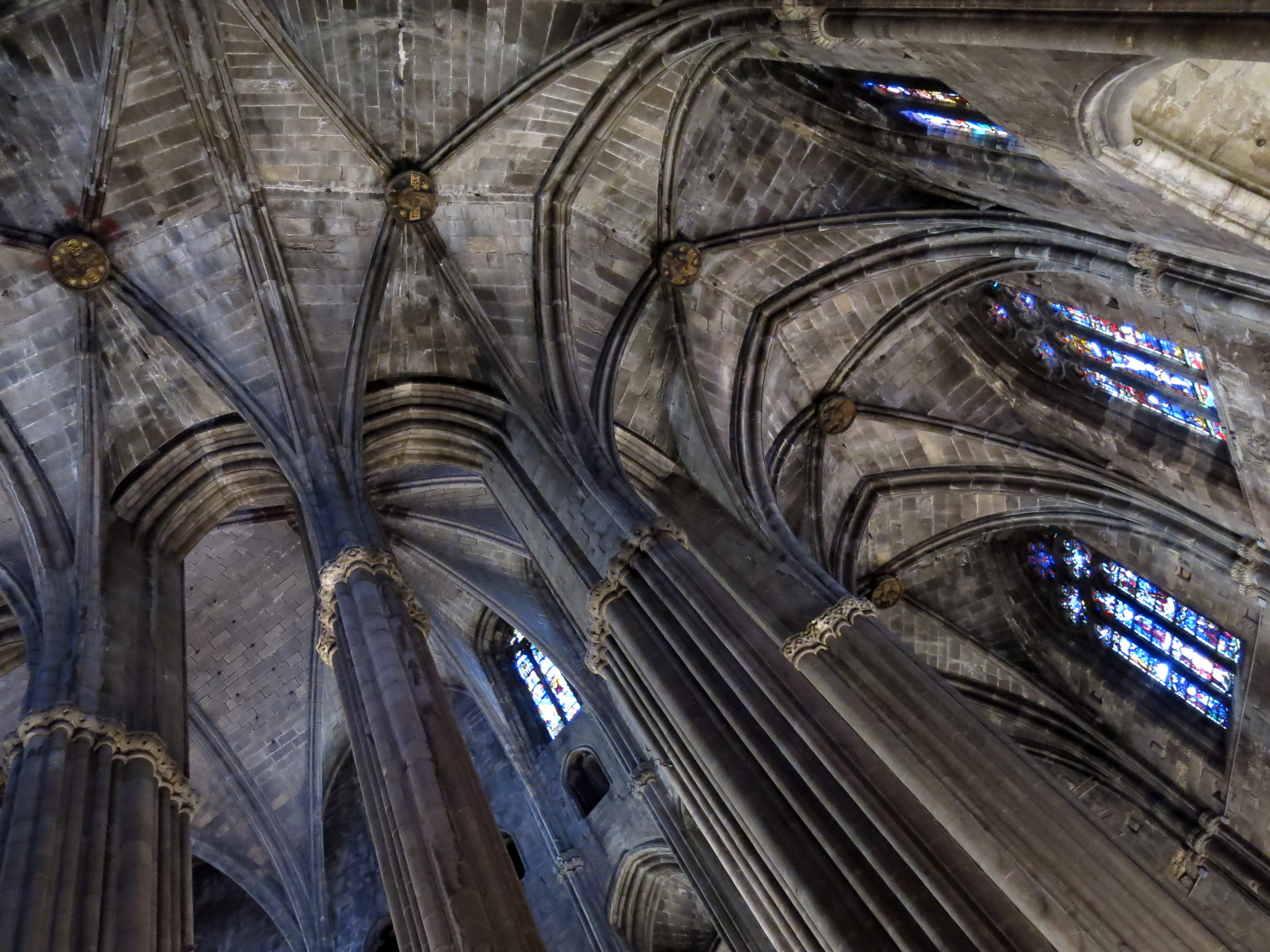 Catedral de Santa Maria (Girona)